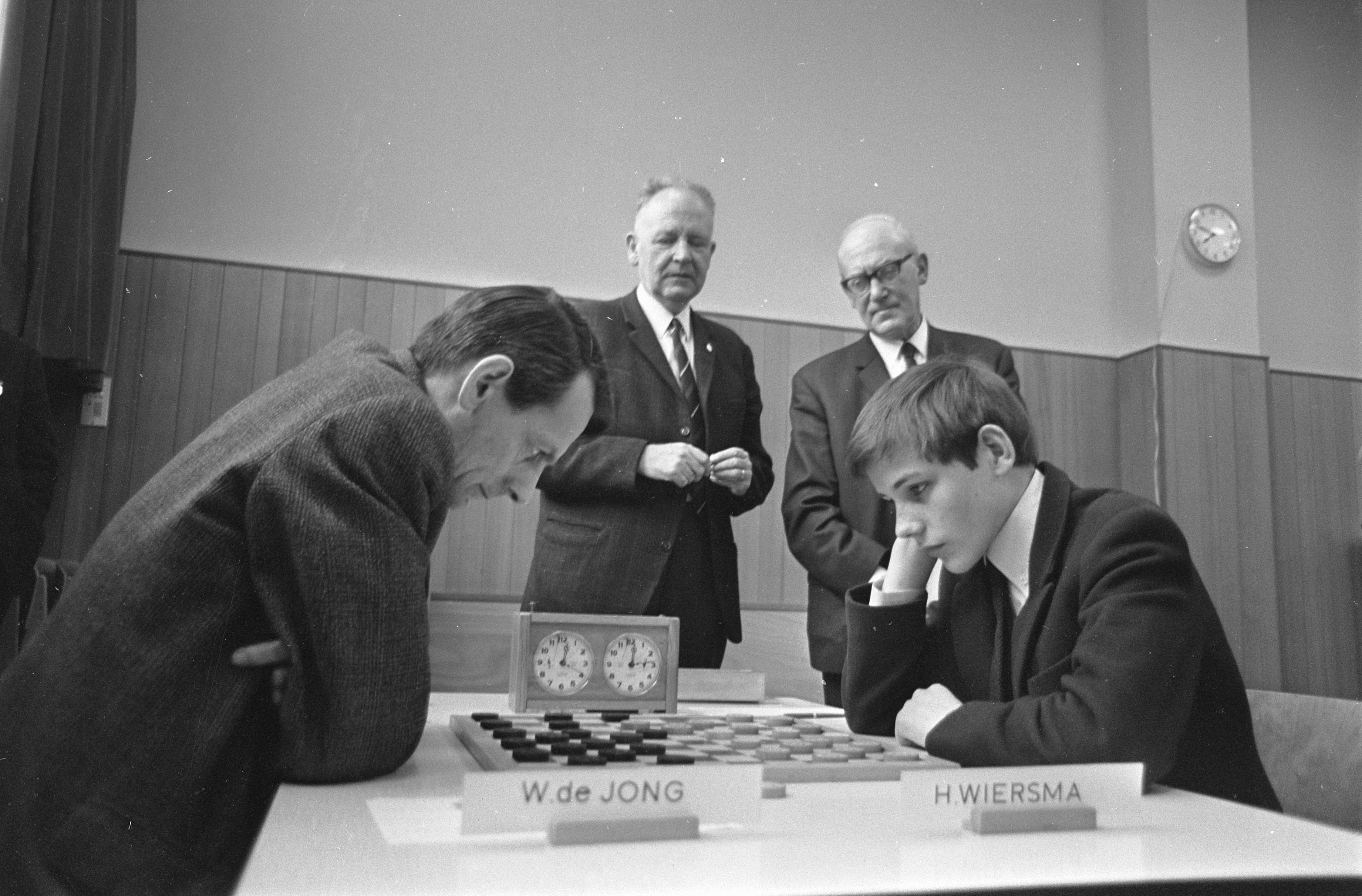 Nederlandse damkampioenschappen 1967, partij tussen Harm Wiersma (r) en W. de Jong